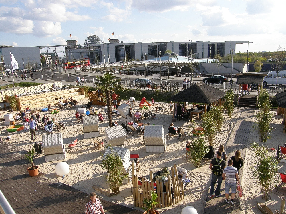 Bundespressestrand Berlin-Mitte